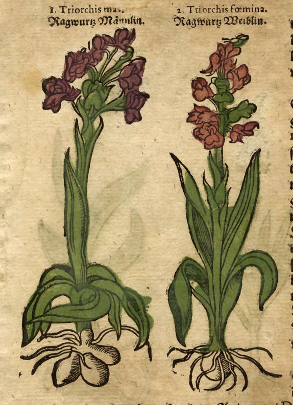 Plate from "Kräuterbuch und Künstliche Conterfeytunge"